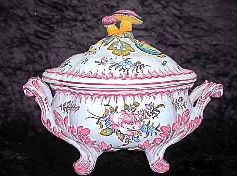 Soupière en faïence par Emile Tessier, Malicorne, France